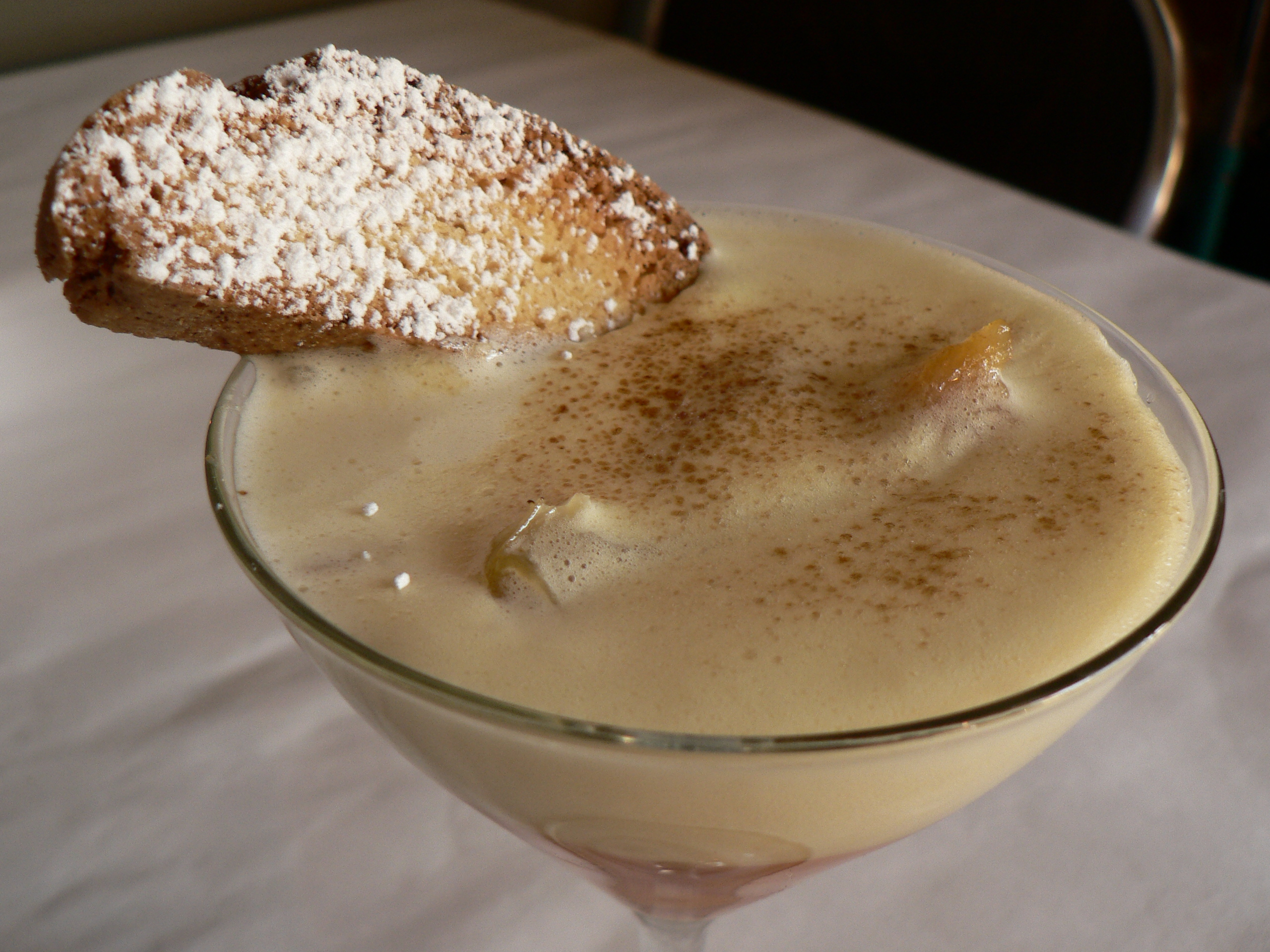 with marsala sabayon